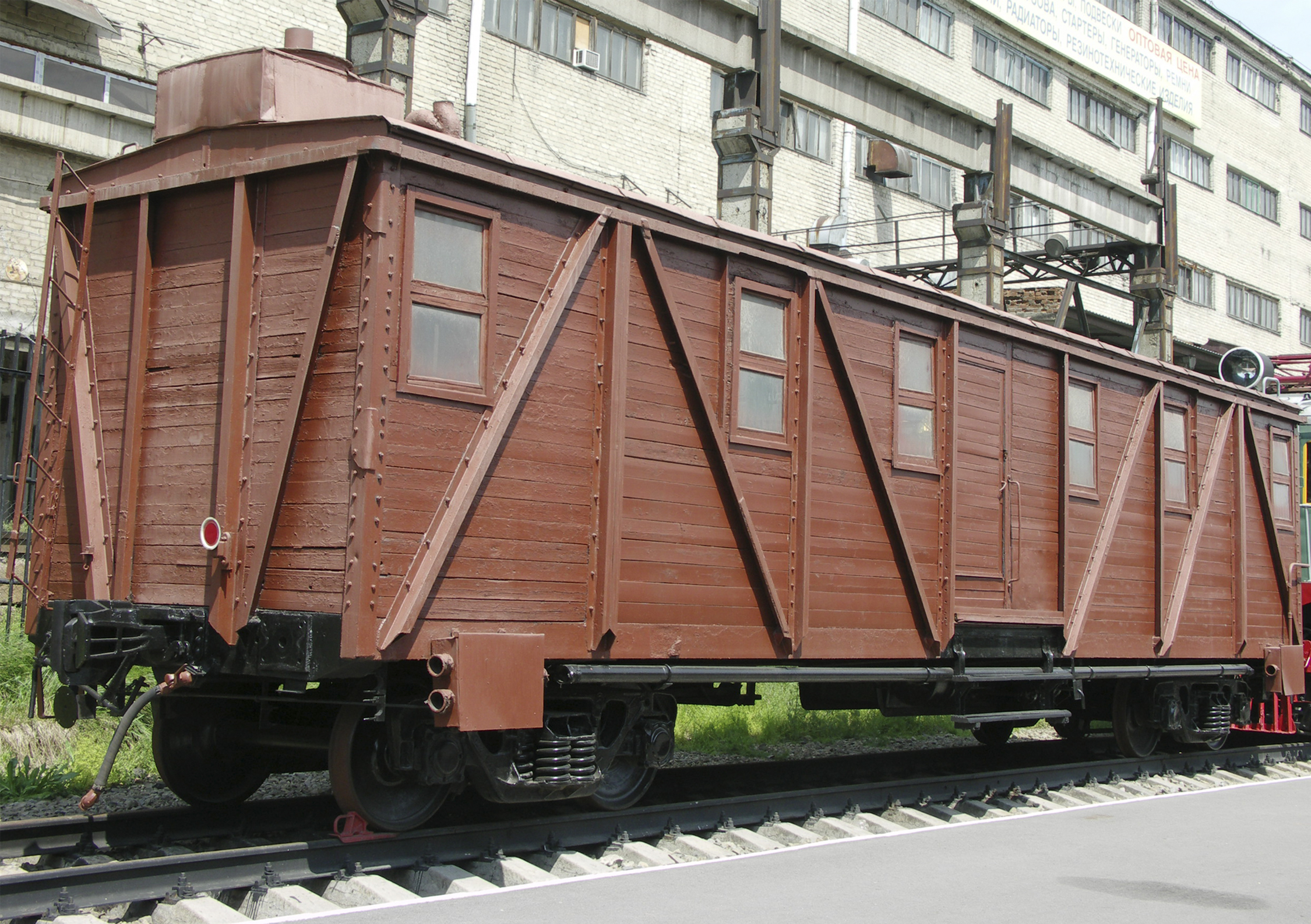 Вагон построен в 1938 году заводом «КРАСНЫЙ ПРОФИНТЕРН»